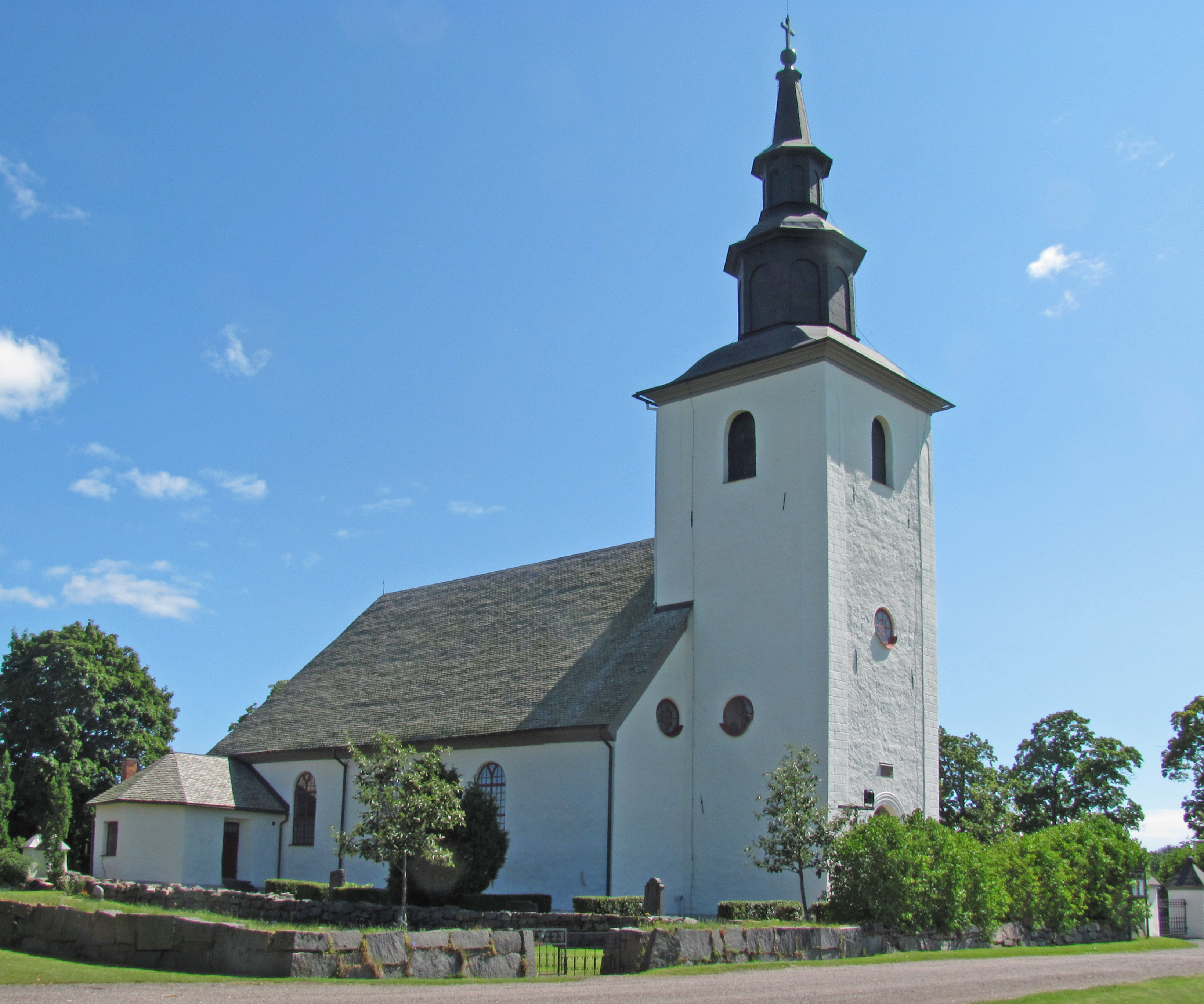 Segerstads kyrka, Karlstads stift